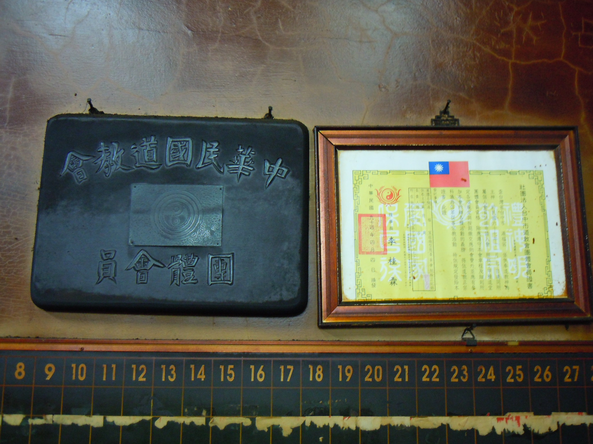 中文（台灣）: 港福宮地址:臺中市西屯區港尾里中清路189號。